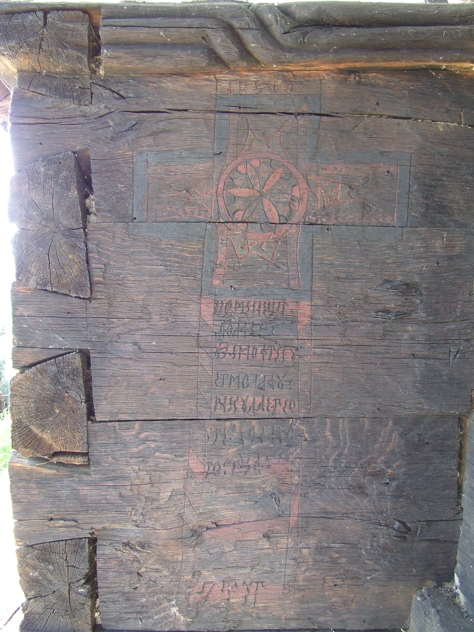 Biserica de lemn din Popești-Cacova, județul Vâlcea.